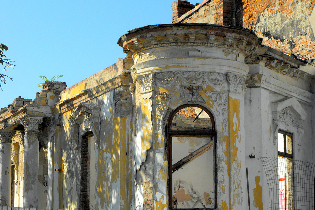 str.Cameliei 38